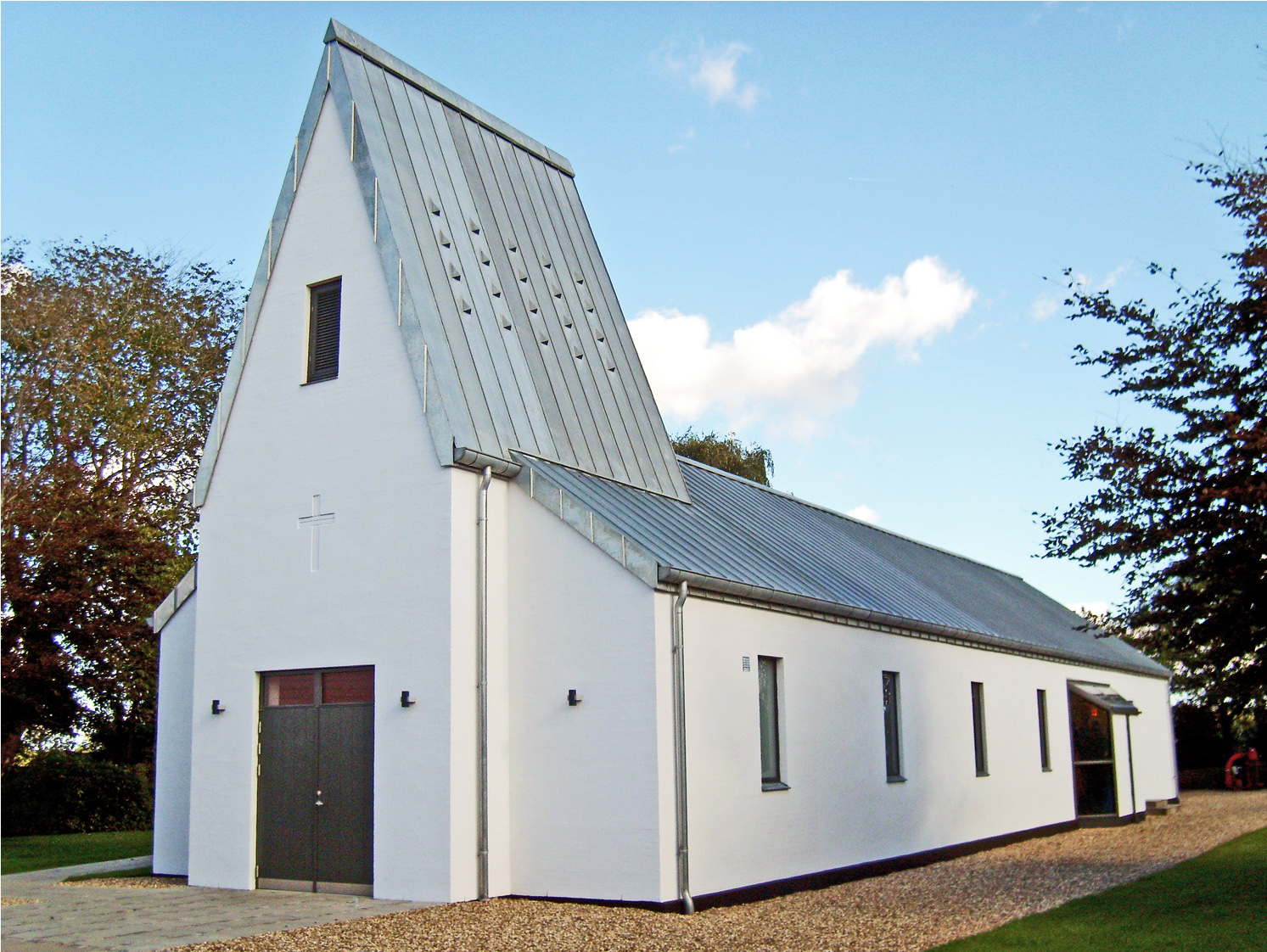 fra sydvest